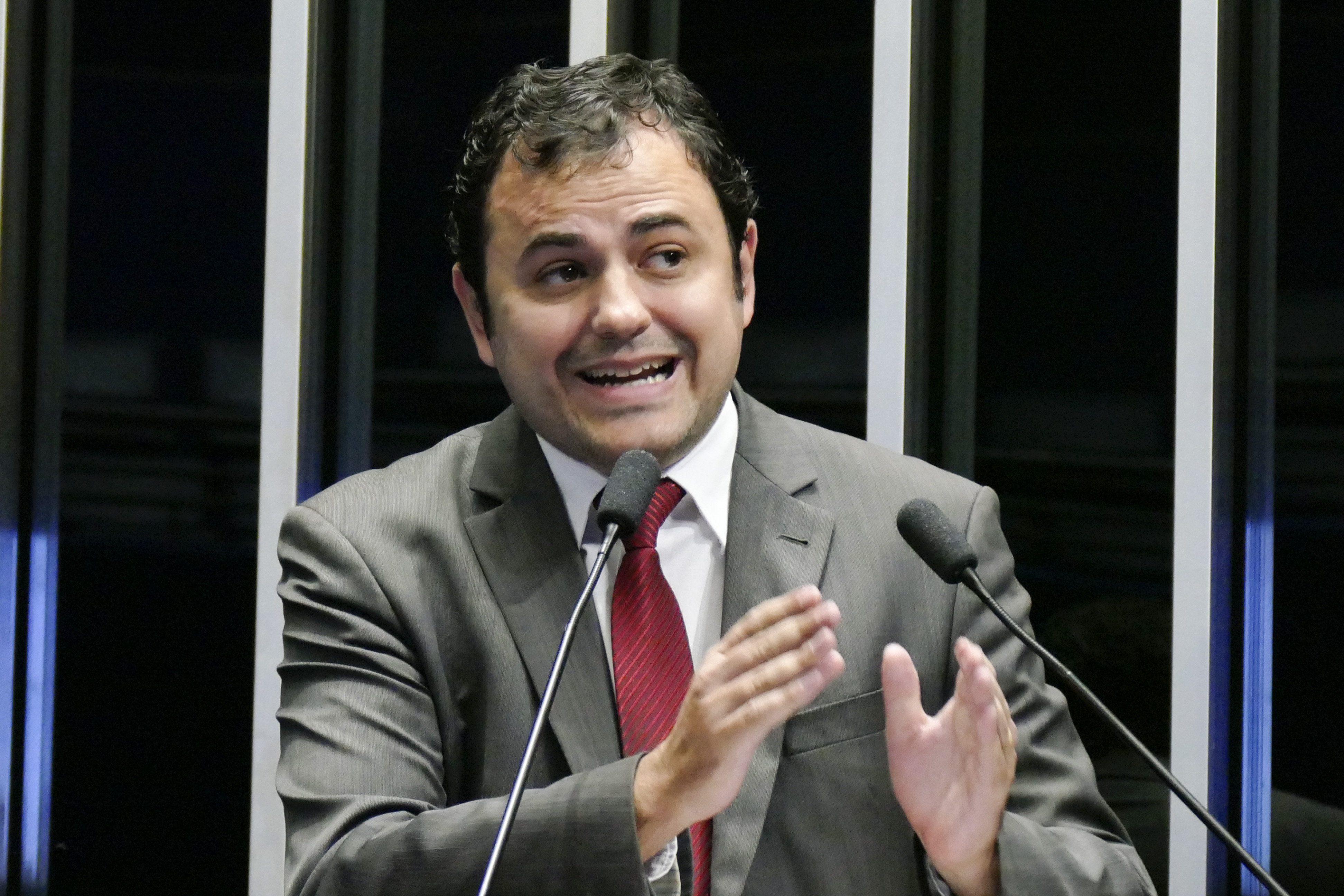 Plenário do Senado Federal durante sessão solene do Congresso Nacional destinada a homenagear a União Nacional dos Estudantes (UNE) pelo aniversário de 80 anos da entidade. Em discurso, deputado Glauber Braga (PSOL-RJ). Foto: Roque de Sá/Agência Senado